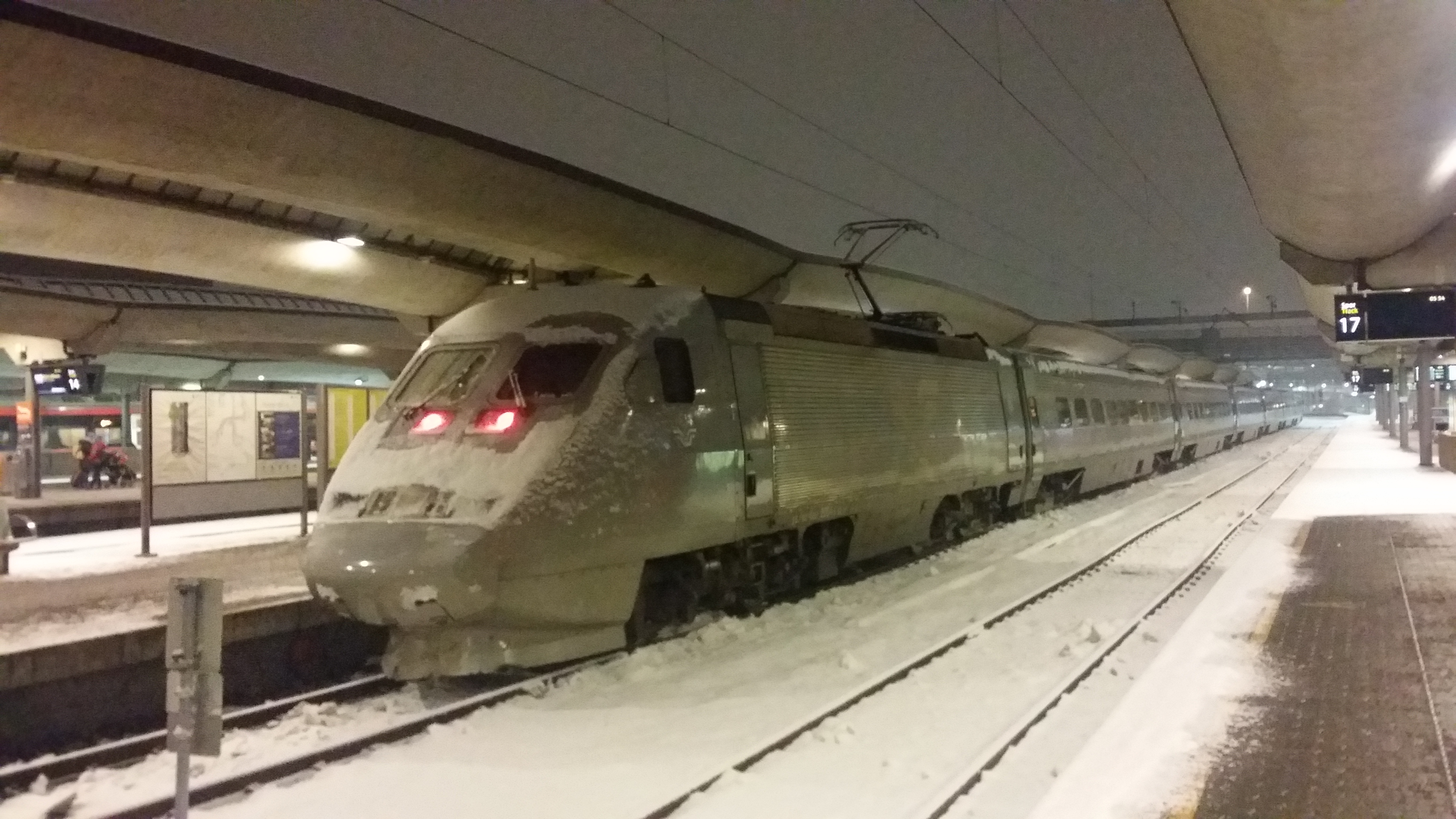 X2000 i morgentoget til Stockholm på Oslo S.